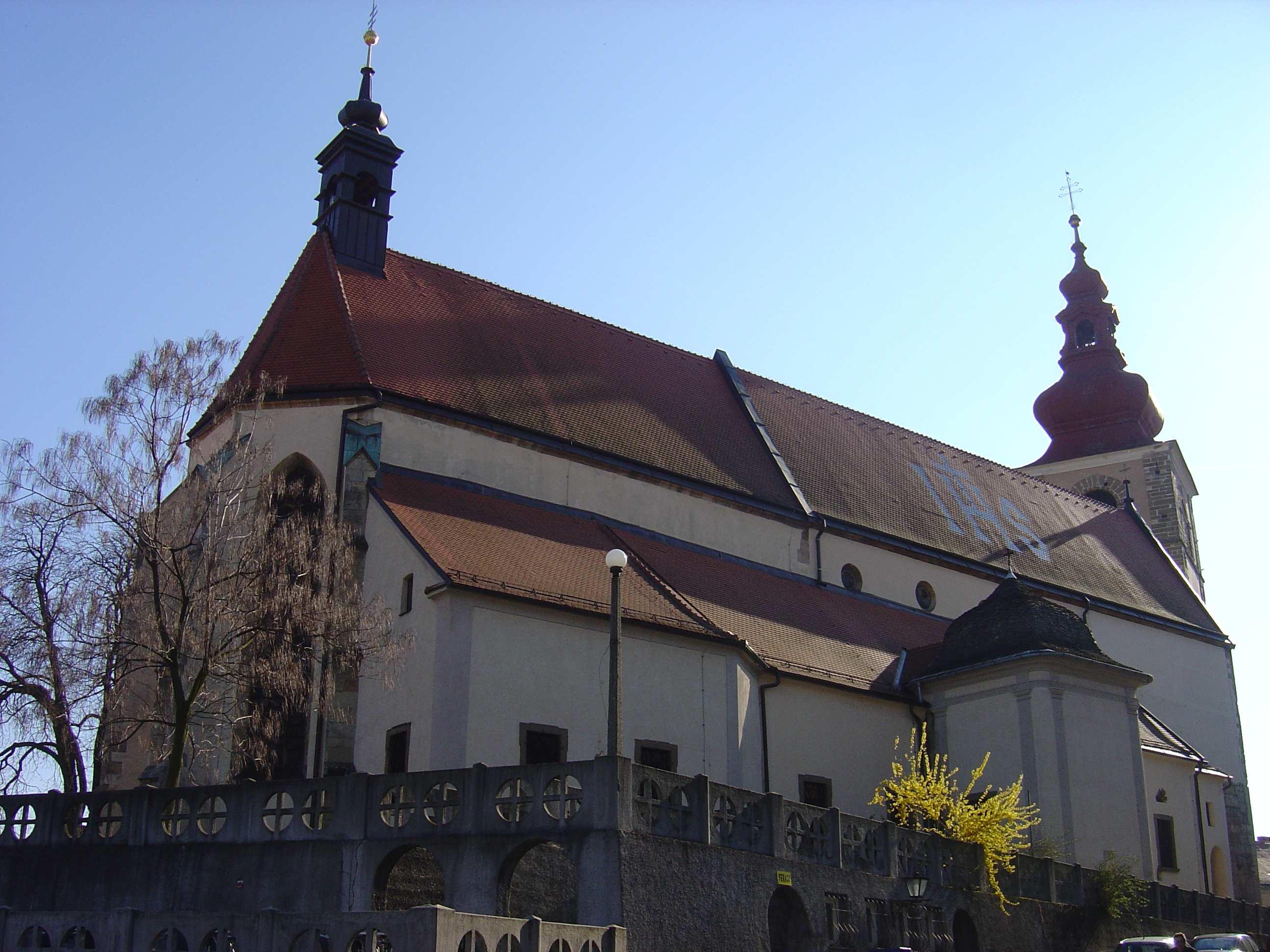 Ptuj, Slovenia